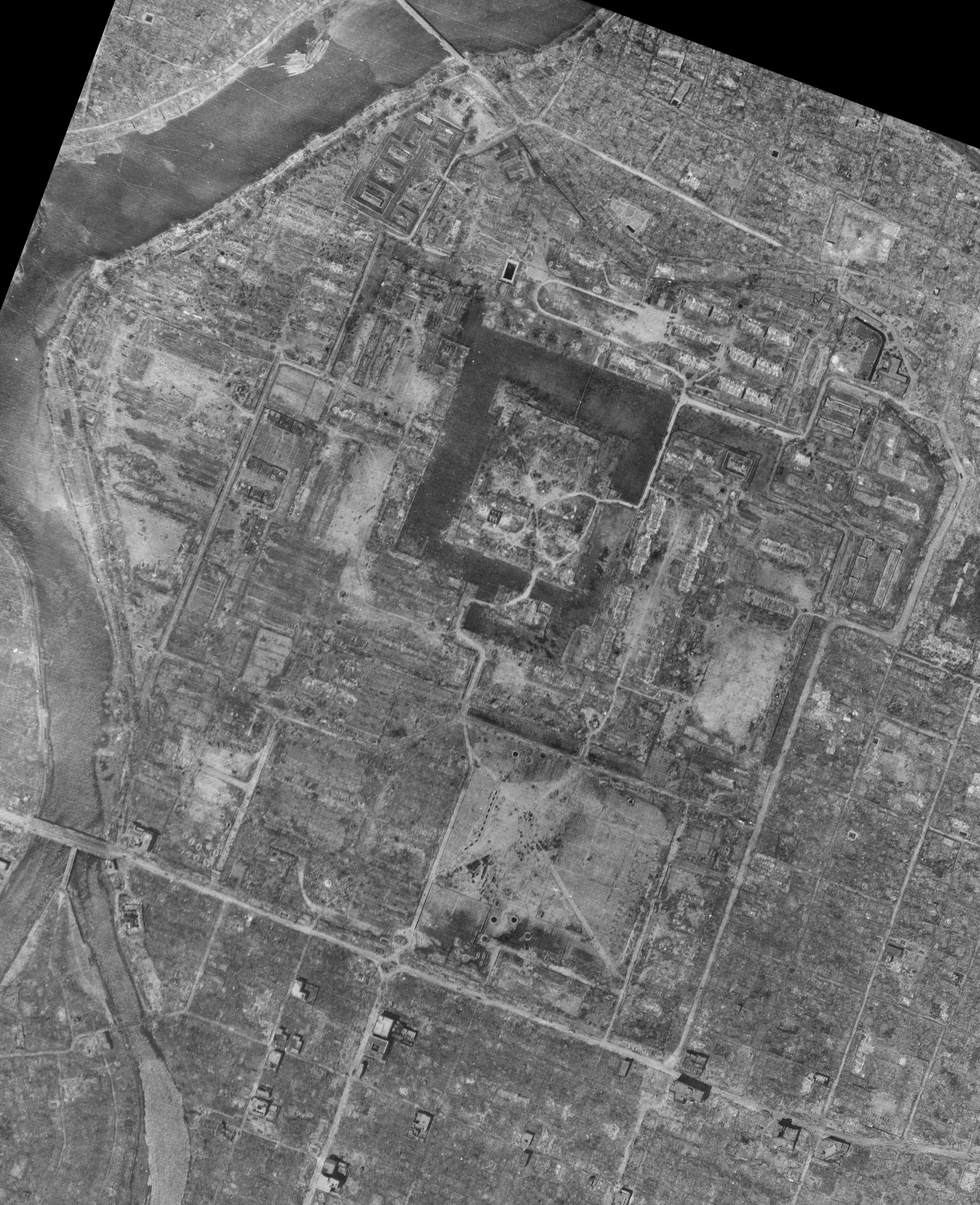 1945年8月8日広島市中区基町